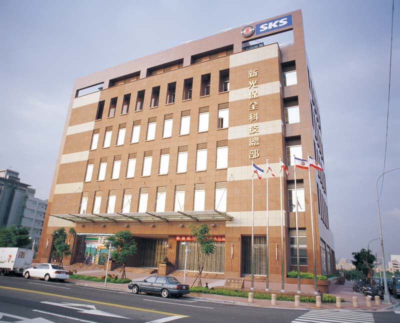 新光保全科技總部，位於臺北市內湖區行愛路128號。